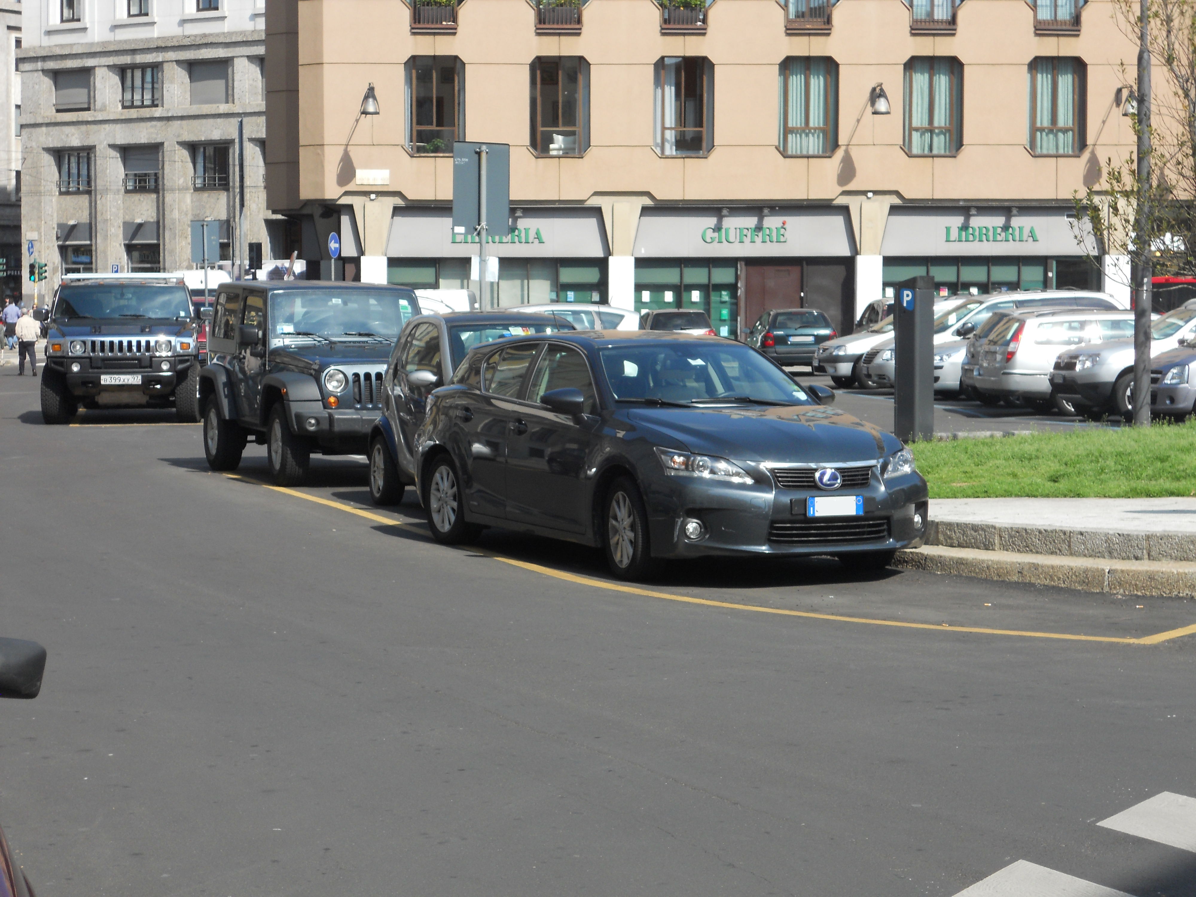 Una Lexus CT a Milano